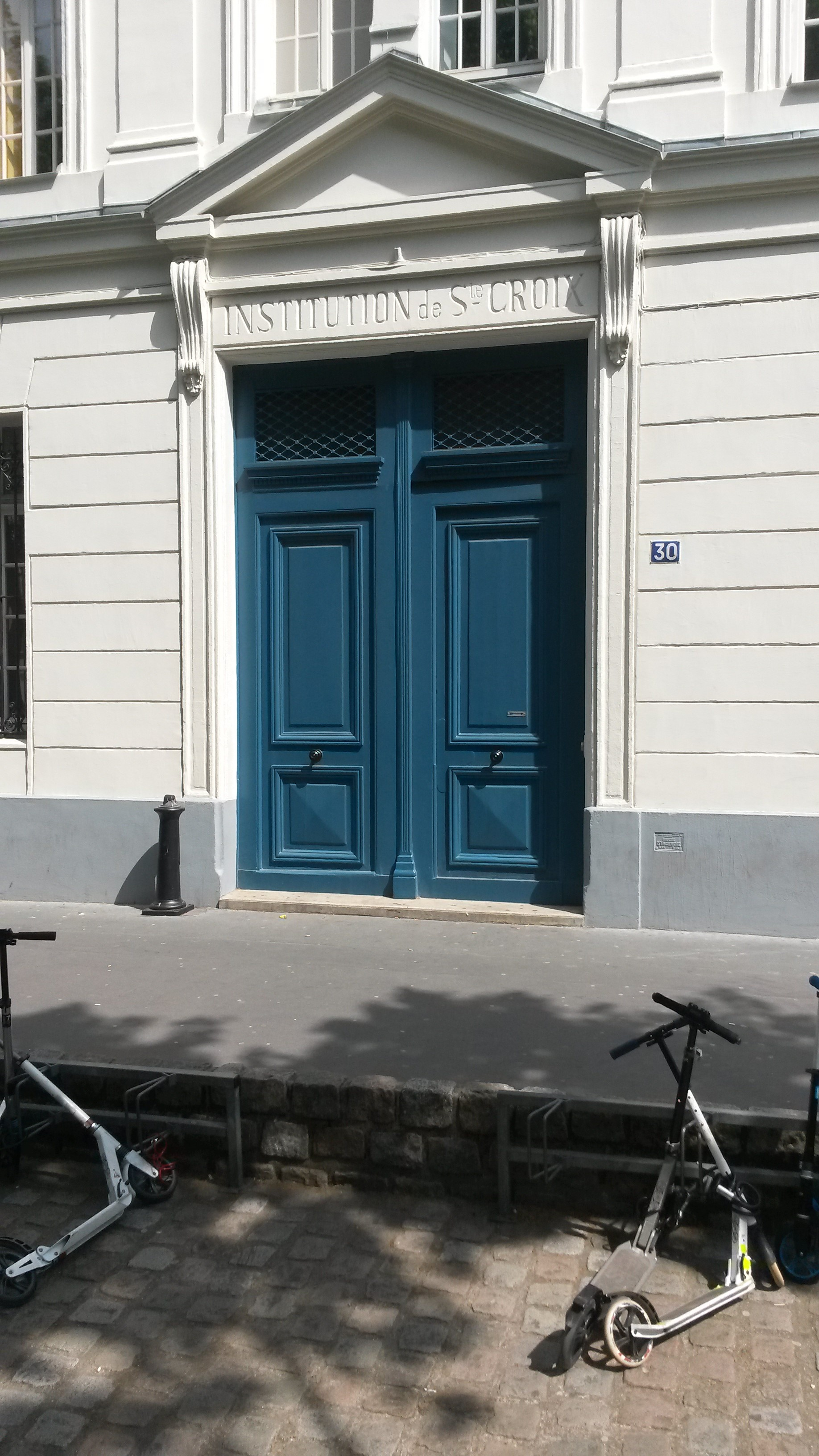 Sainte-Croix de Neuilly